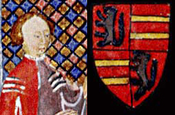 Portrait de Raymond de Puybusque réalisé en 1409 lors de son élection comme capitoul